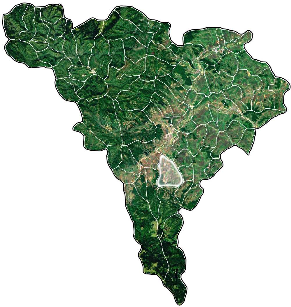 Sebes jud Alba